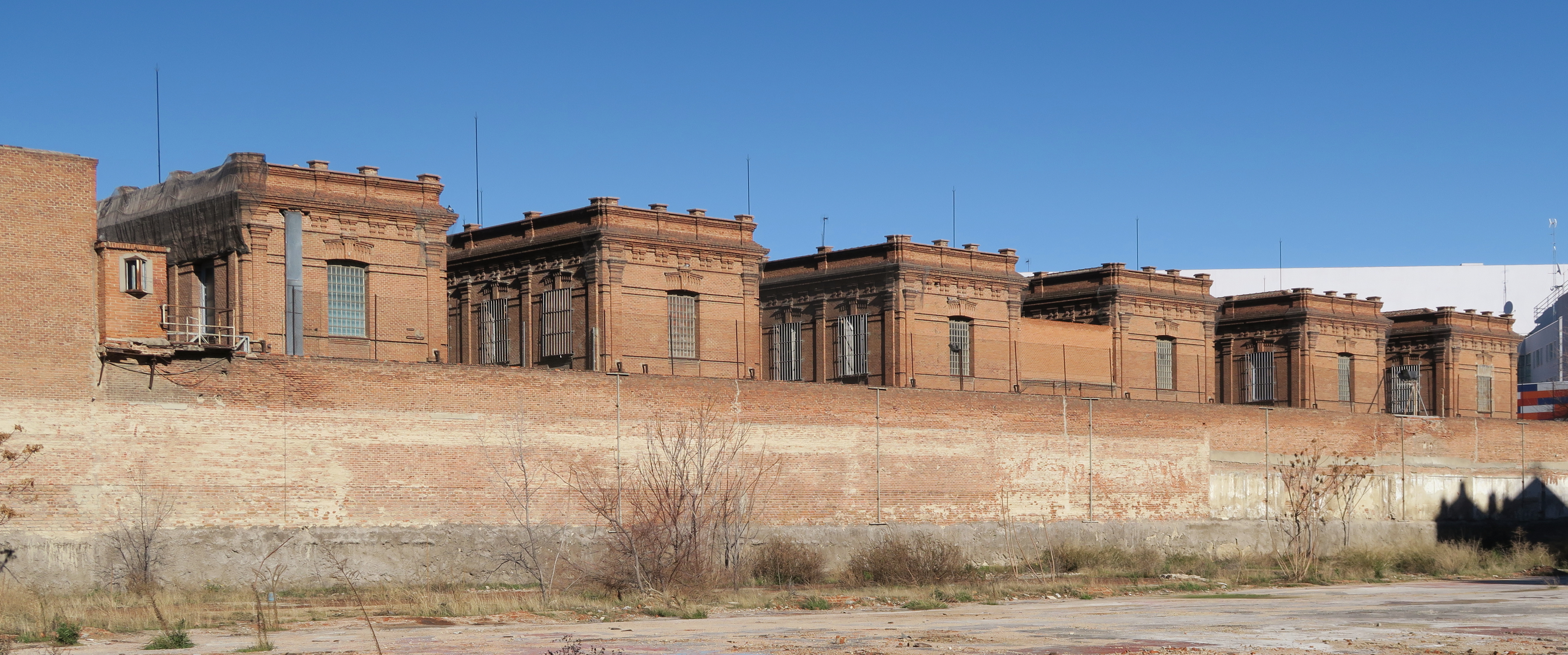 Pabellones antigua cárcel de Yeserias.